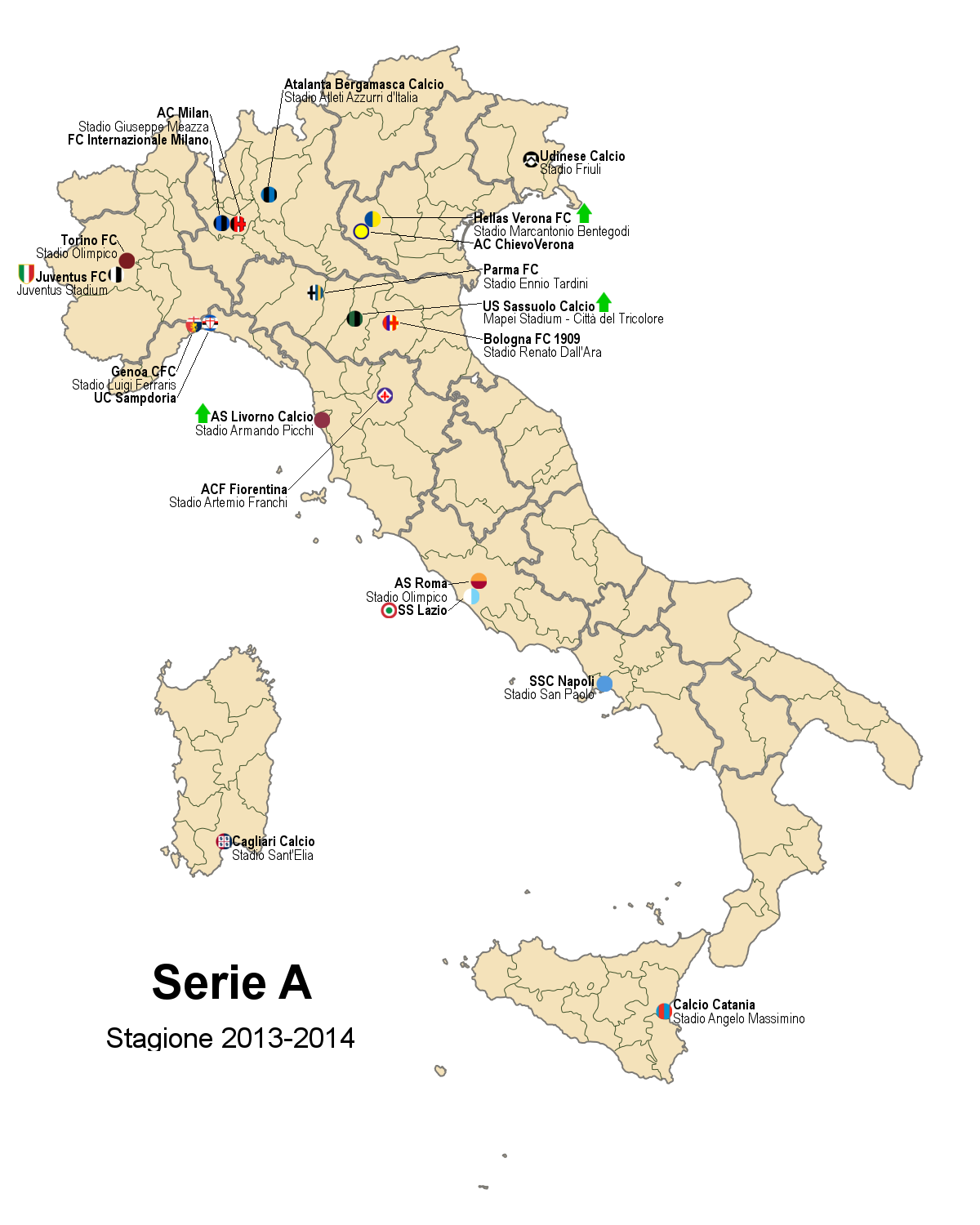 Mappa delle squadre partecipanti alla Serie A 2013-2014